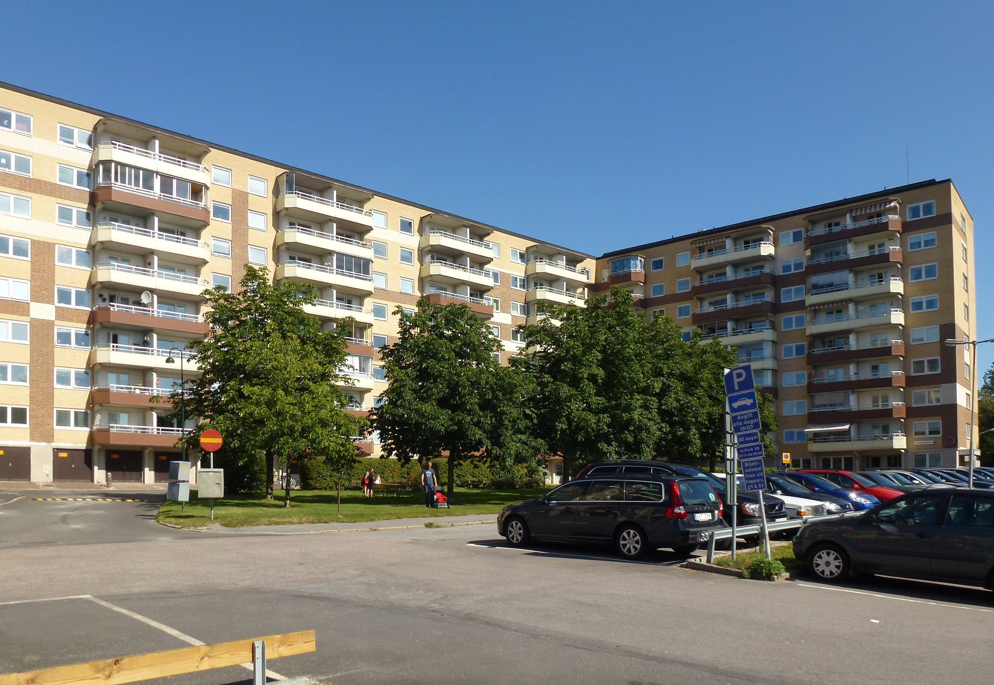 Kallhäll Kopparvägen, modernisering av miljonprogramsbyggen